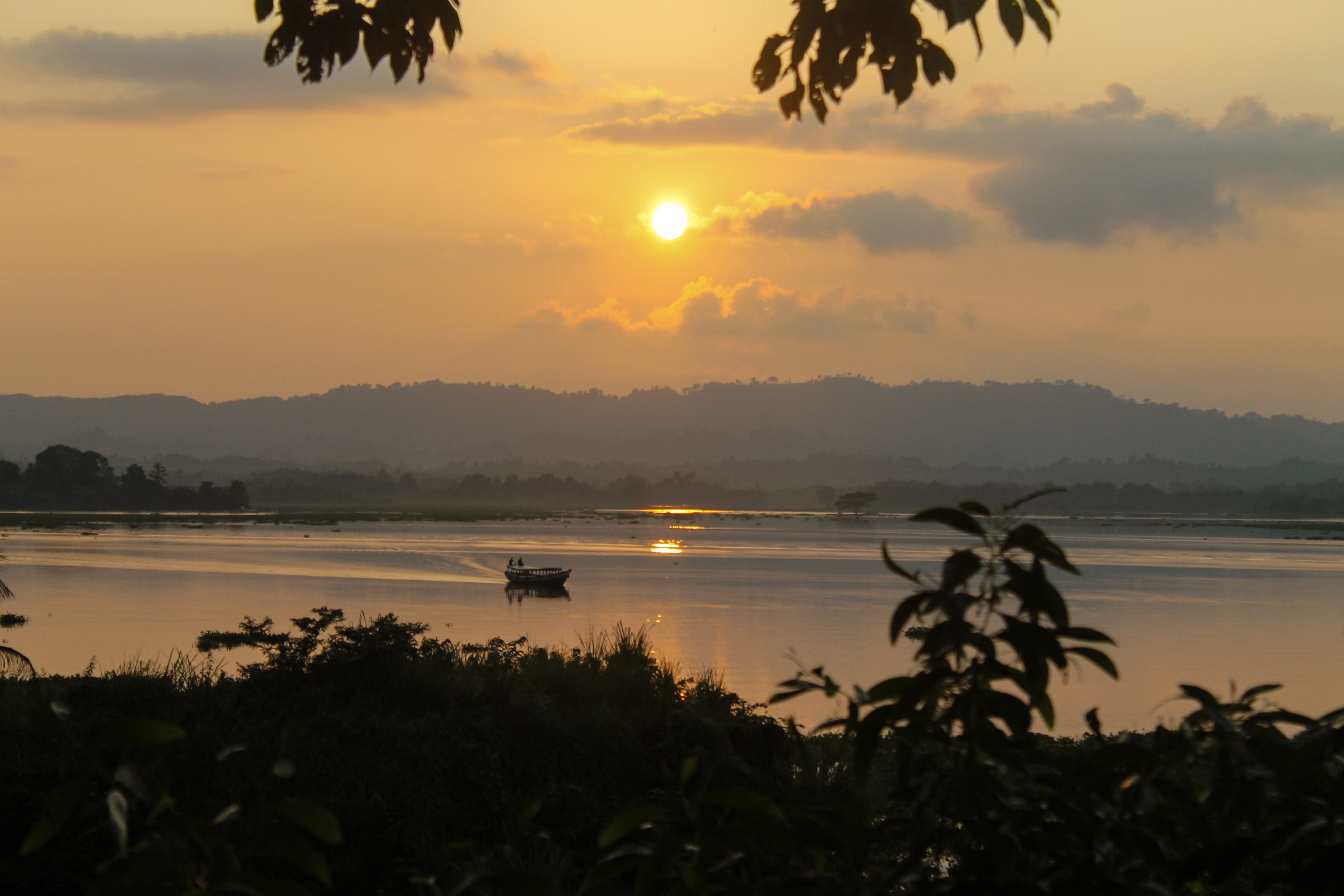 কাপ্তাই জাতীয় উদ্যান